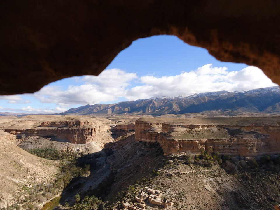 Canyon de Ghoufi